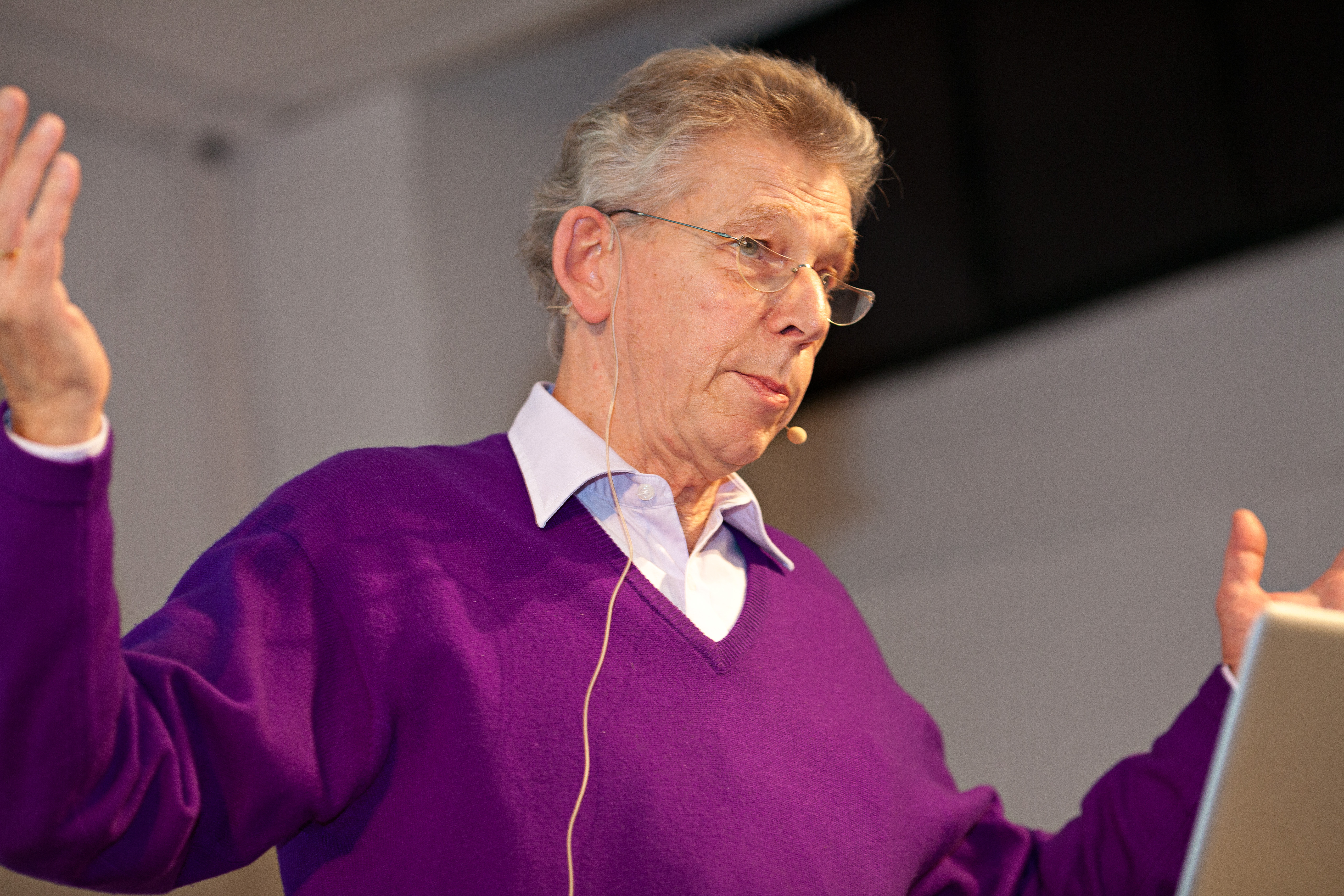 Gerard Unger auf dem Webfontday der Typographischen Gesellschaft München (tgm).